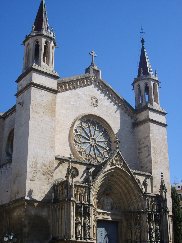 Basílica de Santa Maria. Vilafranca del Penedès